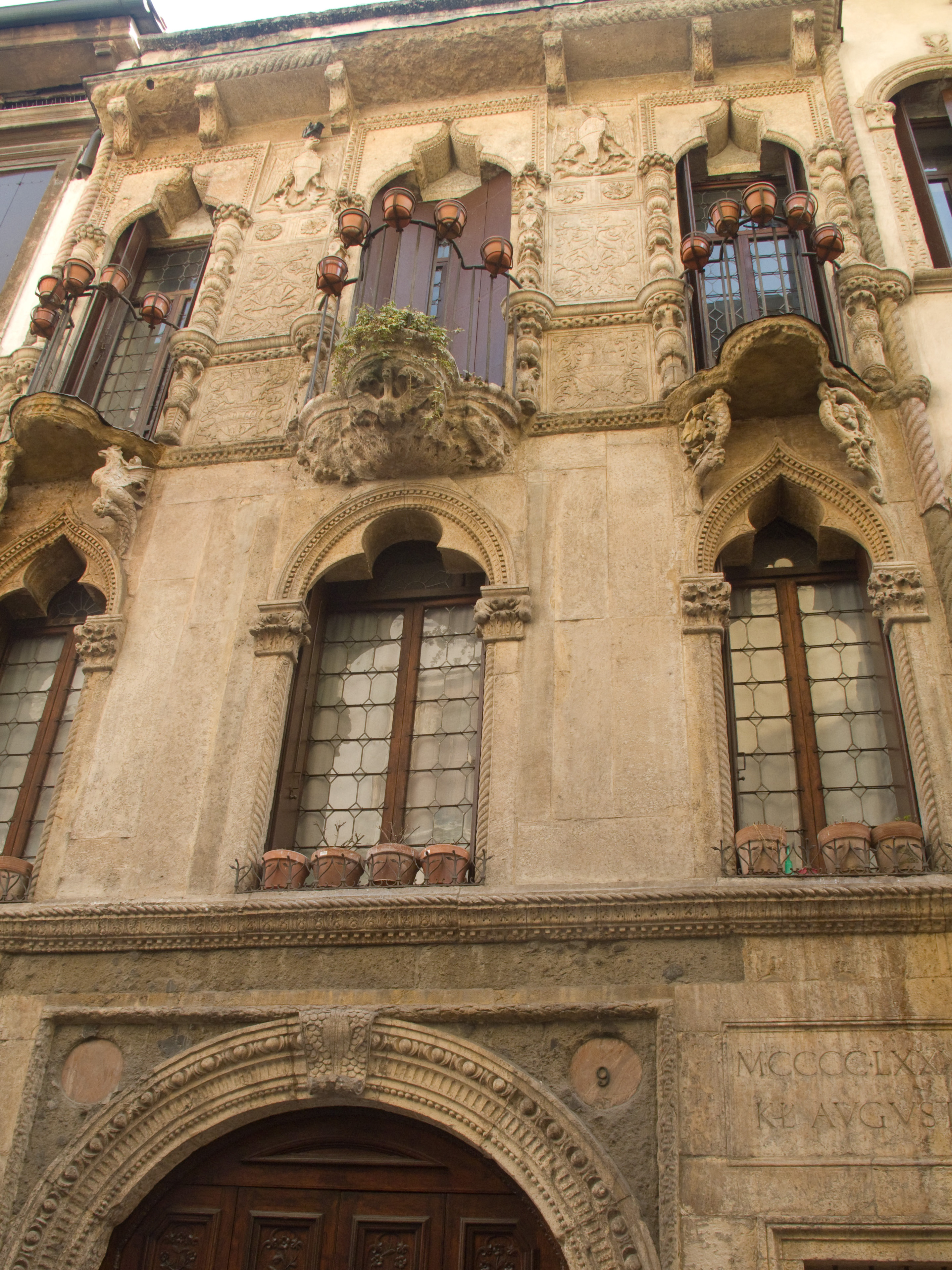 Vicenza - Palazzo Pigafetta, facciata